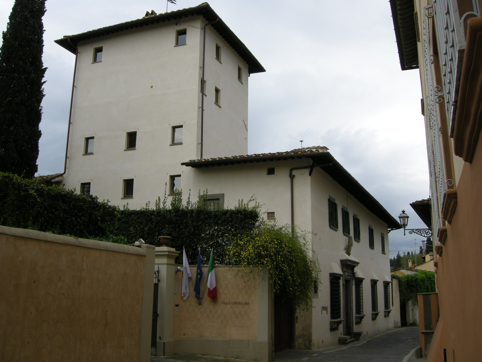 Villa il pian dei giullari